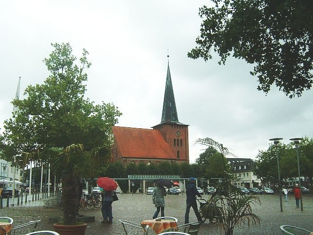 Neustadt in Schleswig Holstein, Marktplatz mit Kirche